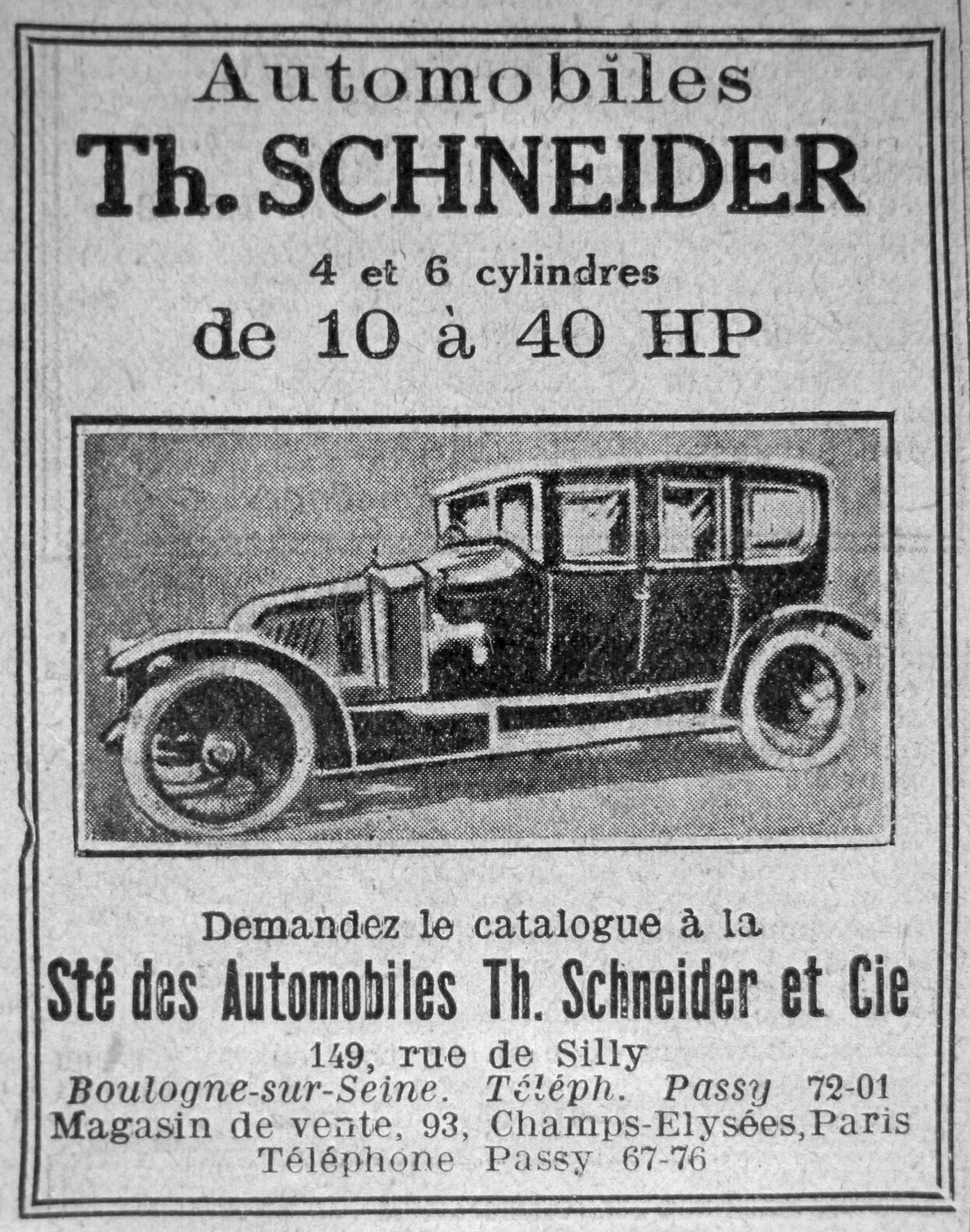 Publicité des automobiles Théodore Schneider. Parue dans Le pays de France, 1ère année, n° 3, page 4, 10 juillet 1914